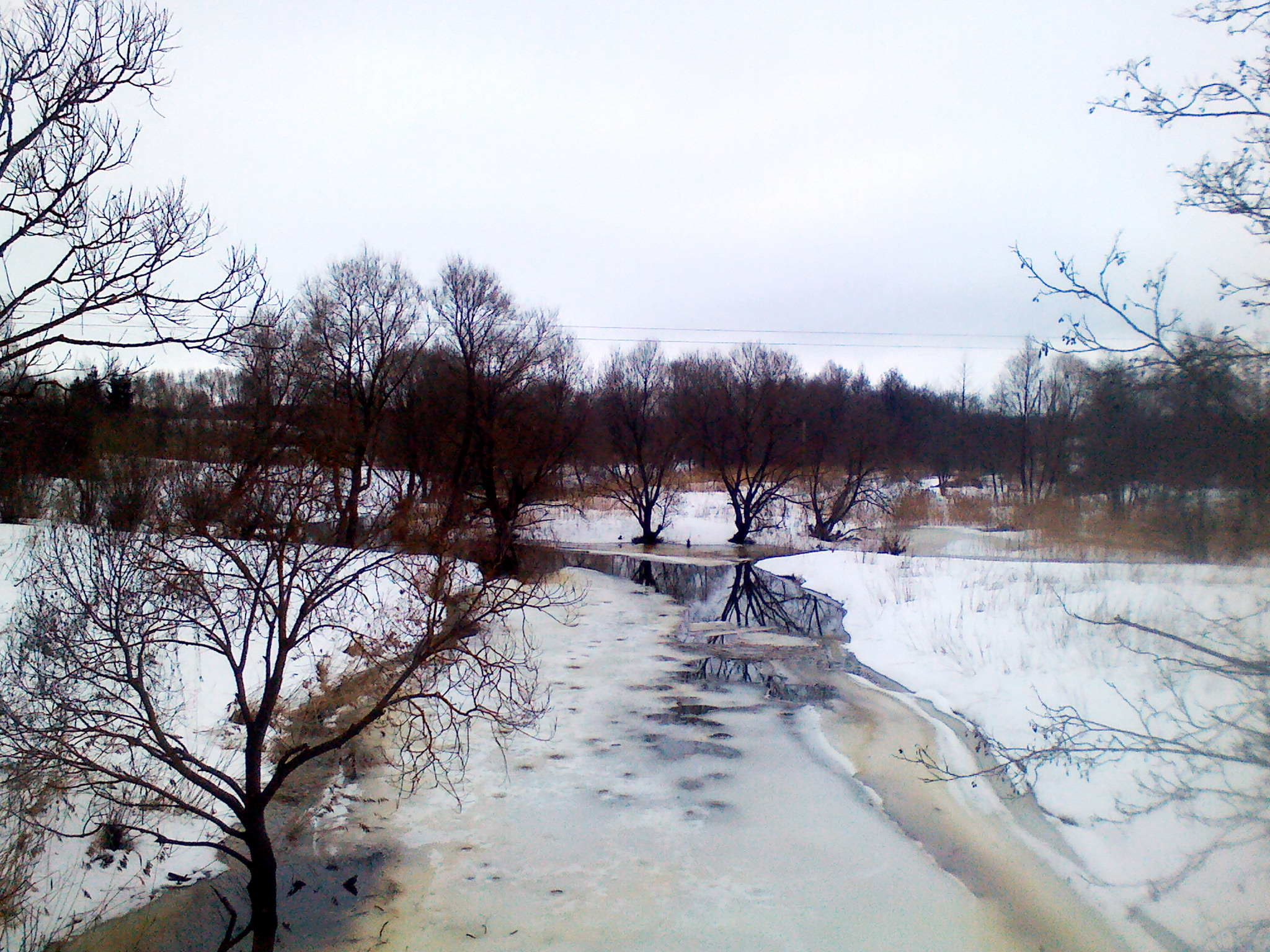 Река Лахва (приток Днепра) в деревне Сташино